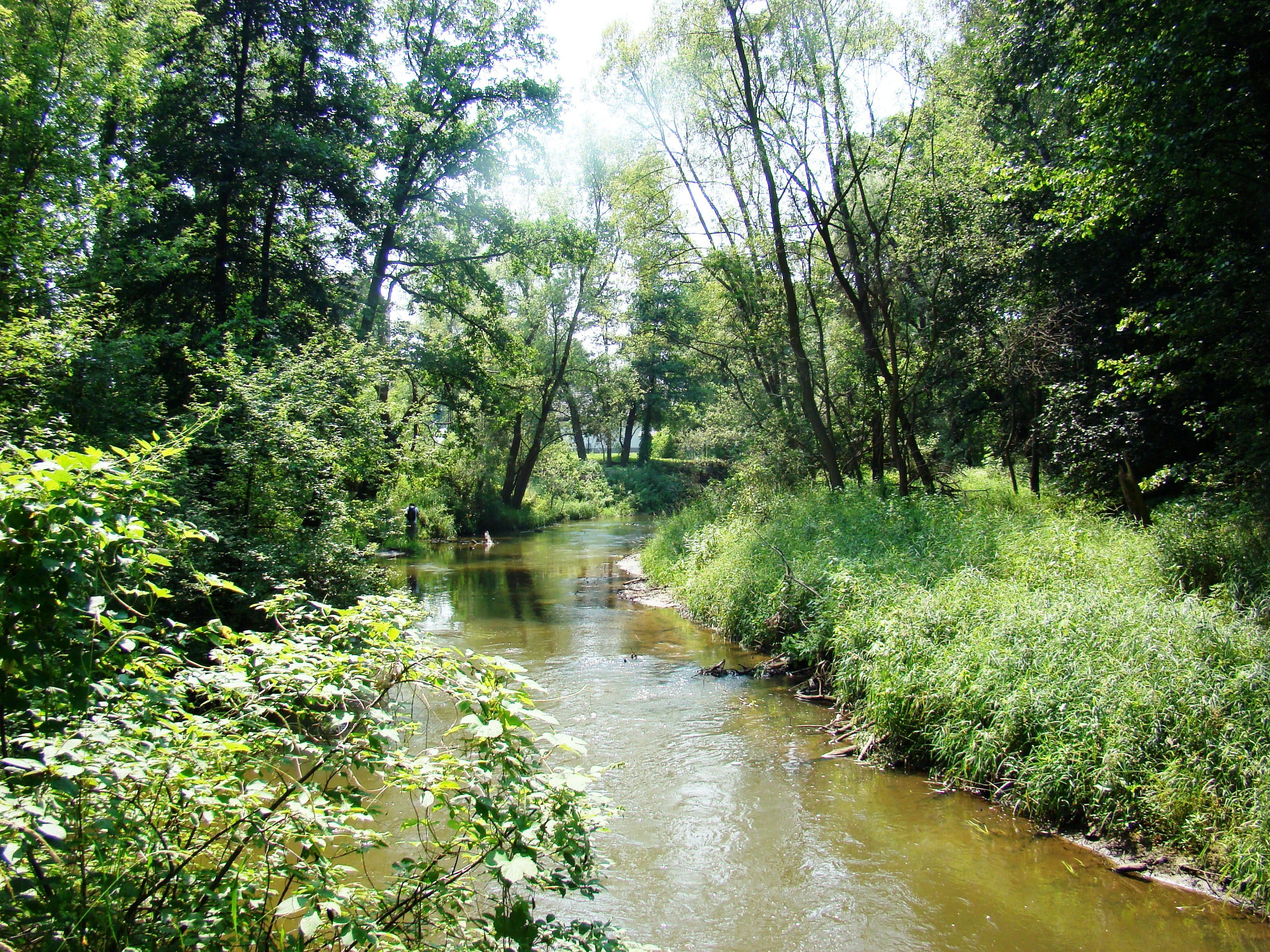 Rzeka Warta pomiędzy Poczesną, a Zawodziem